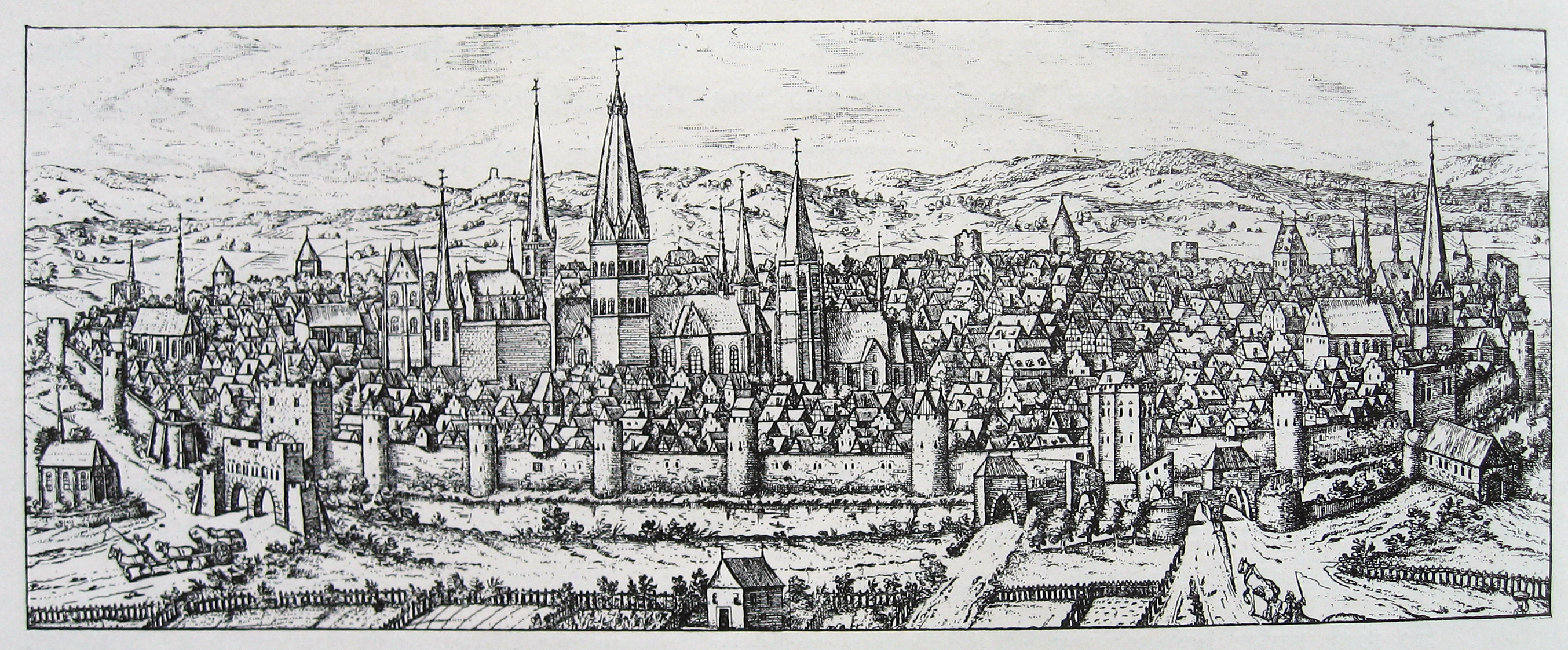 Soest, Braun, Stadtansicht